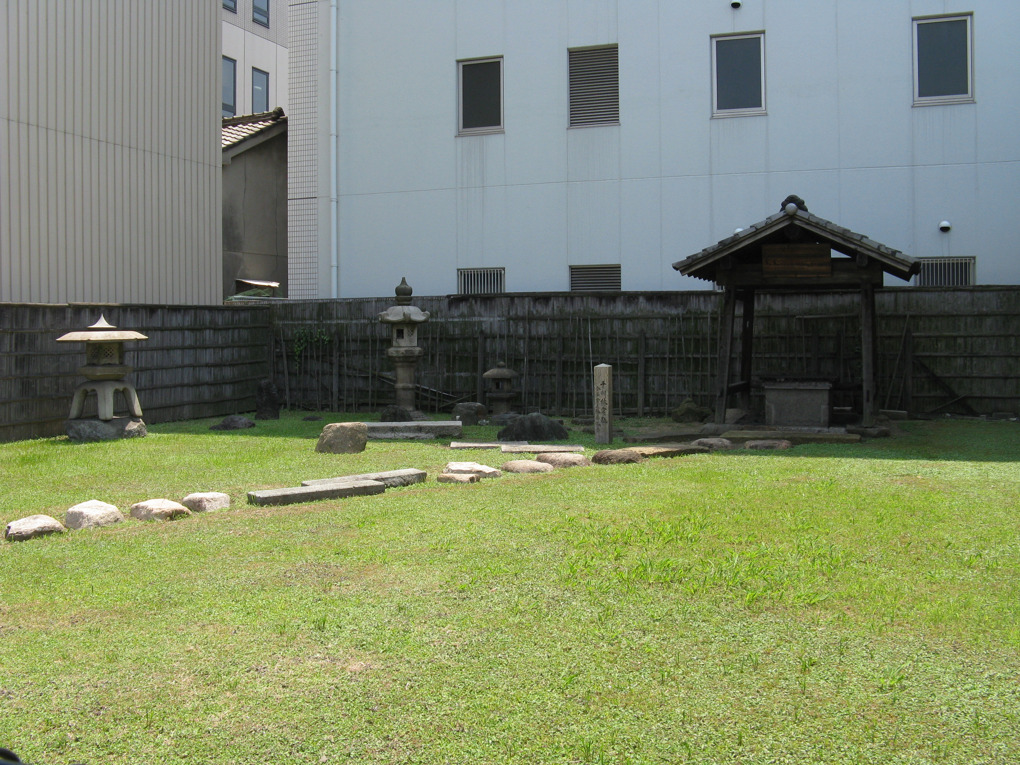 千利休の屋敷趾